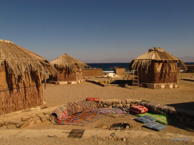 Aussteigerurlaub Camp bei Nuweiba